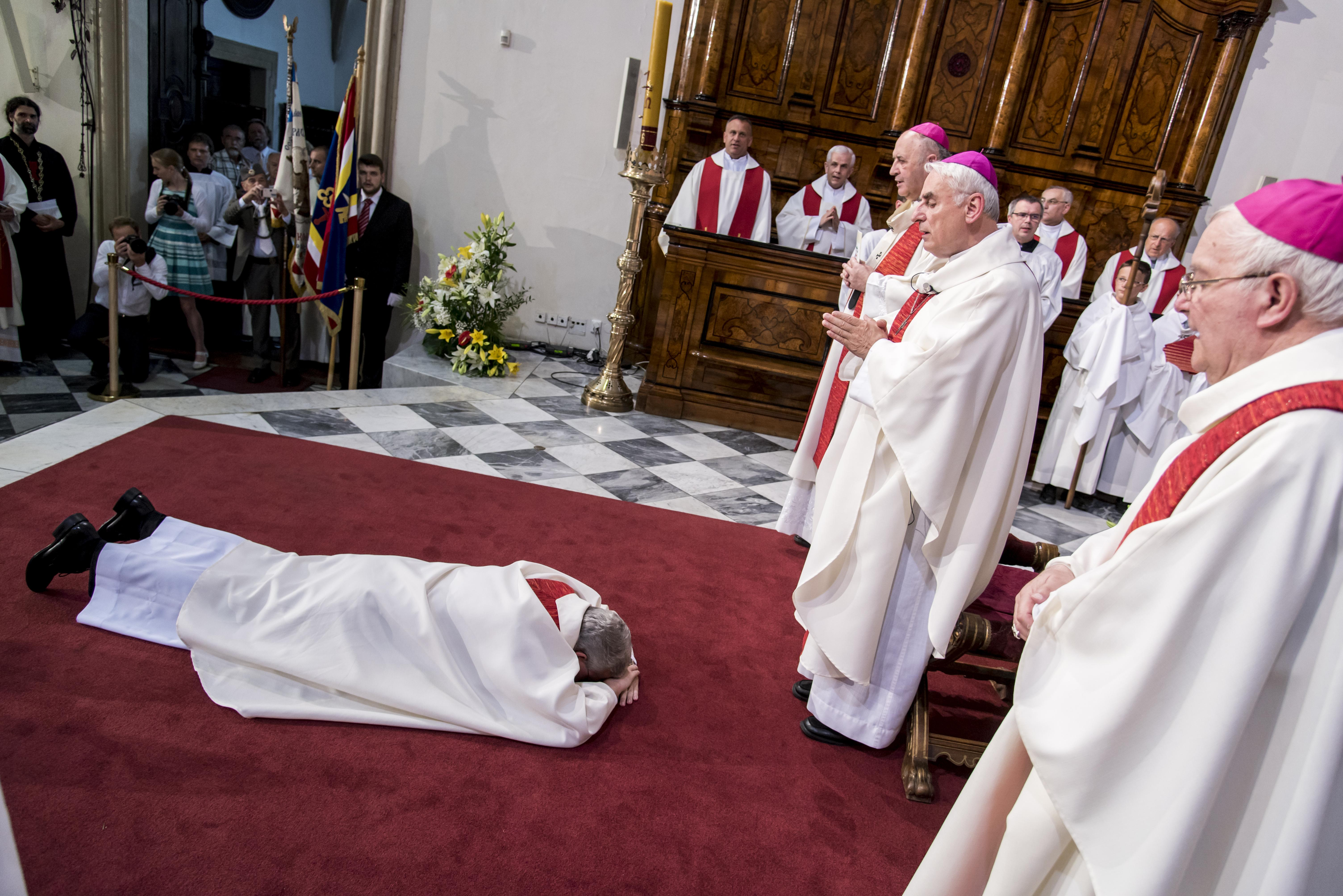 Fotografie z biskupského svěcení Pavla Konzbula v Brně 29. června 2016. Autor: Vít Kobza